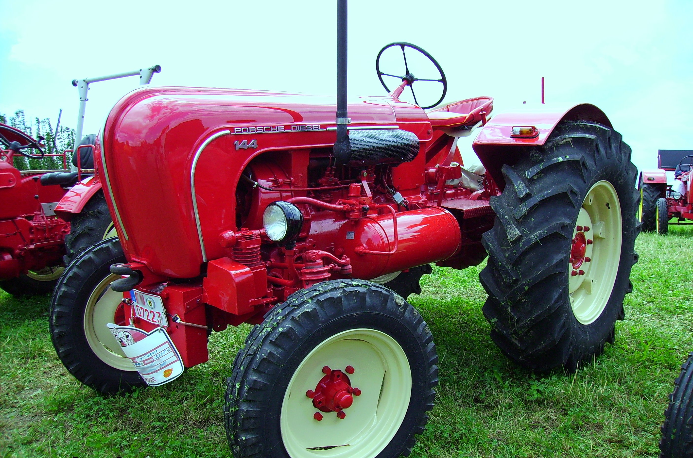 Porsche-Diesel P144